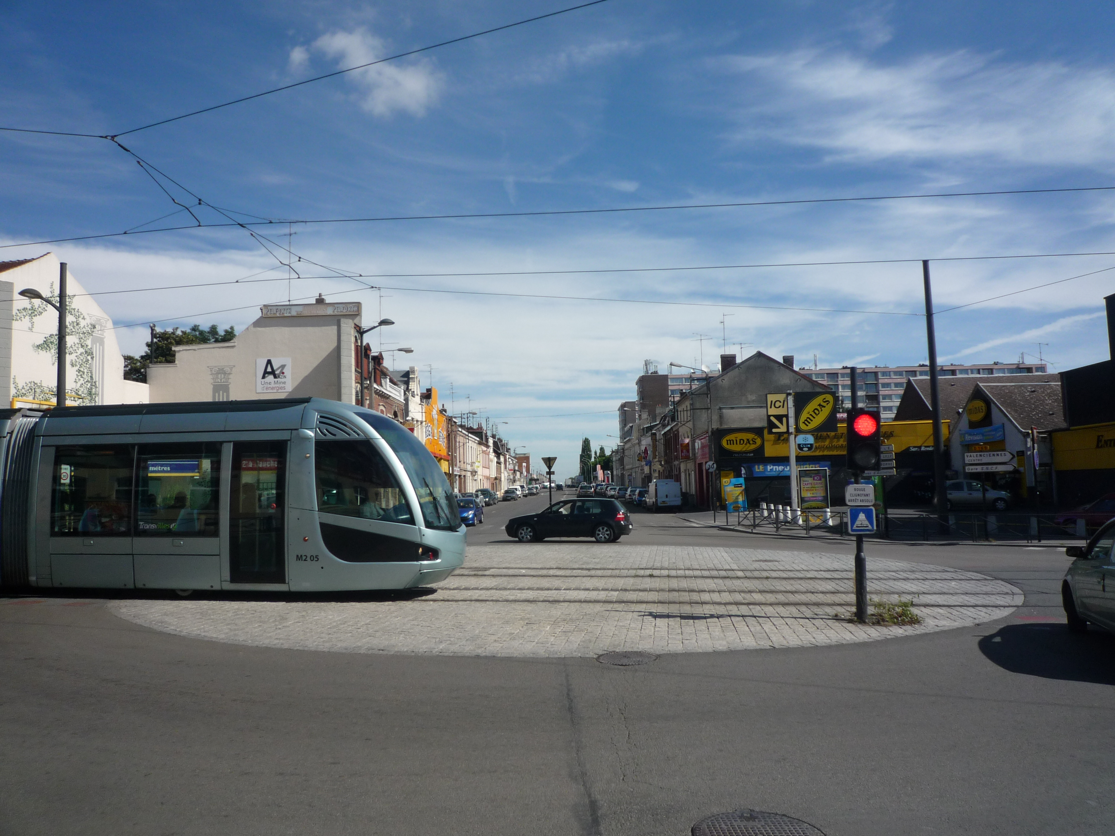 Futur embranchement de la ligne C du Tramway de Valenciennes, Anzin, Nord, Nord-Pas-de-Calais, France